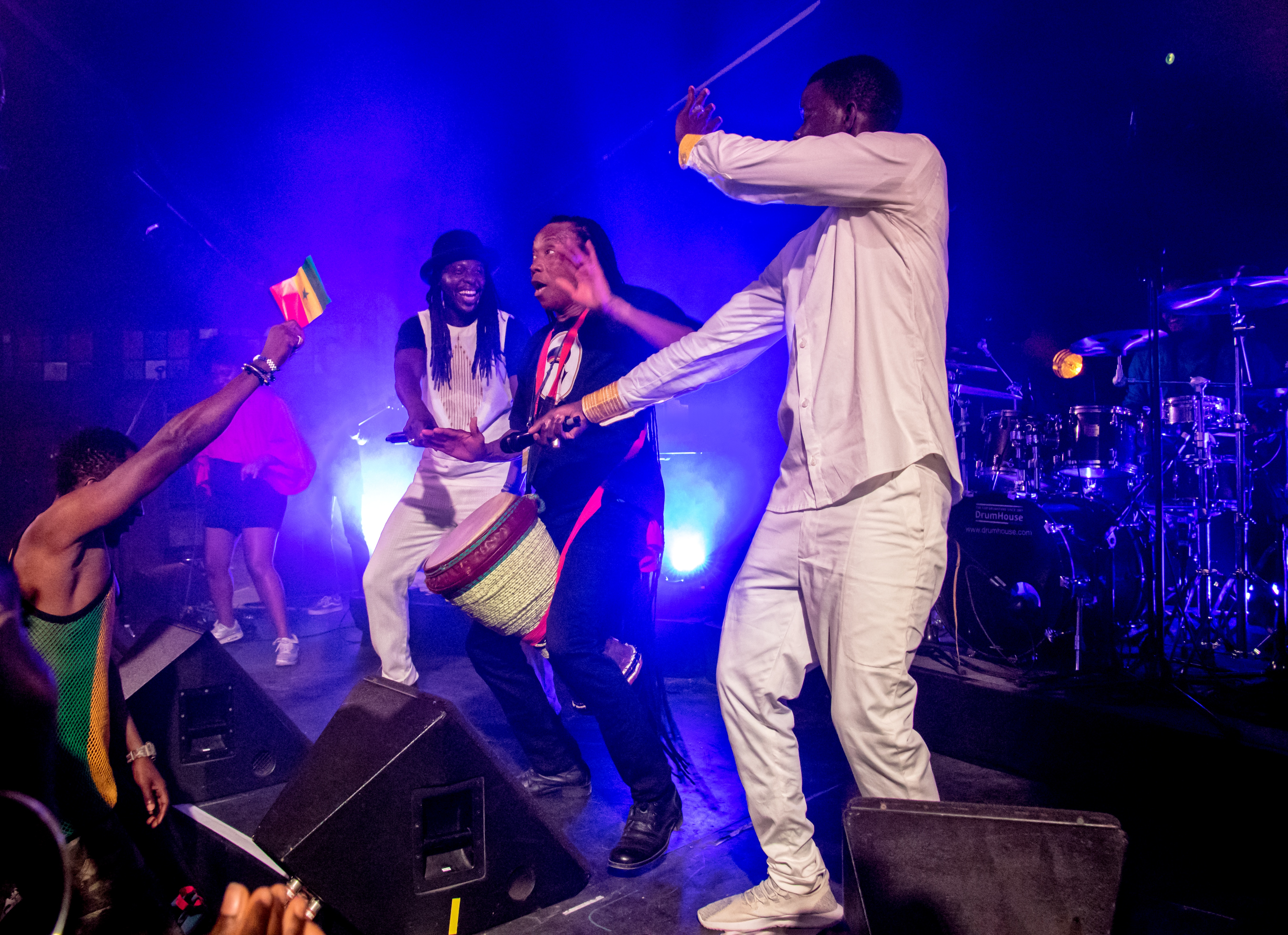 Bilder vom Zelt Musik Festival 2018 in Freiburg im Breisgau Daara J am 29.07.2018 im Spiegelzelt